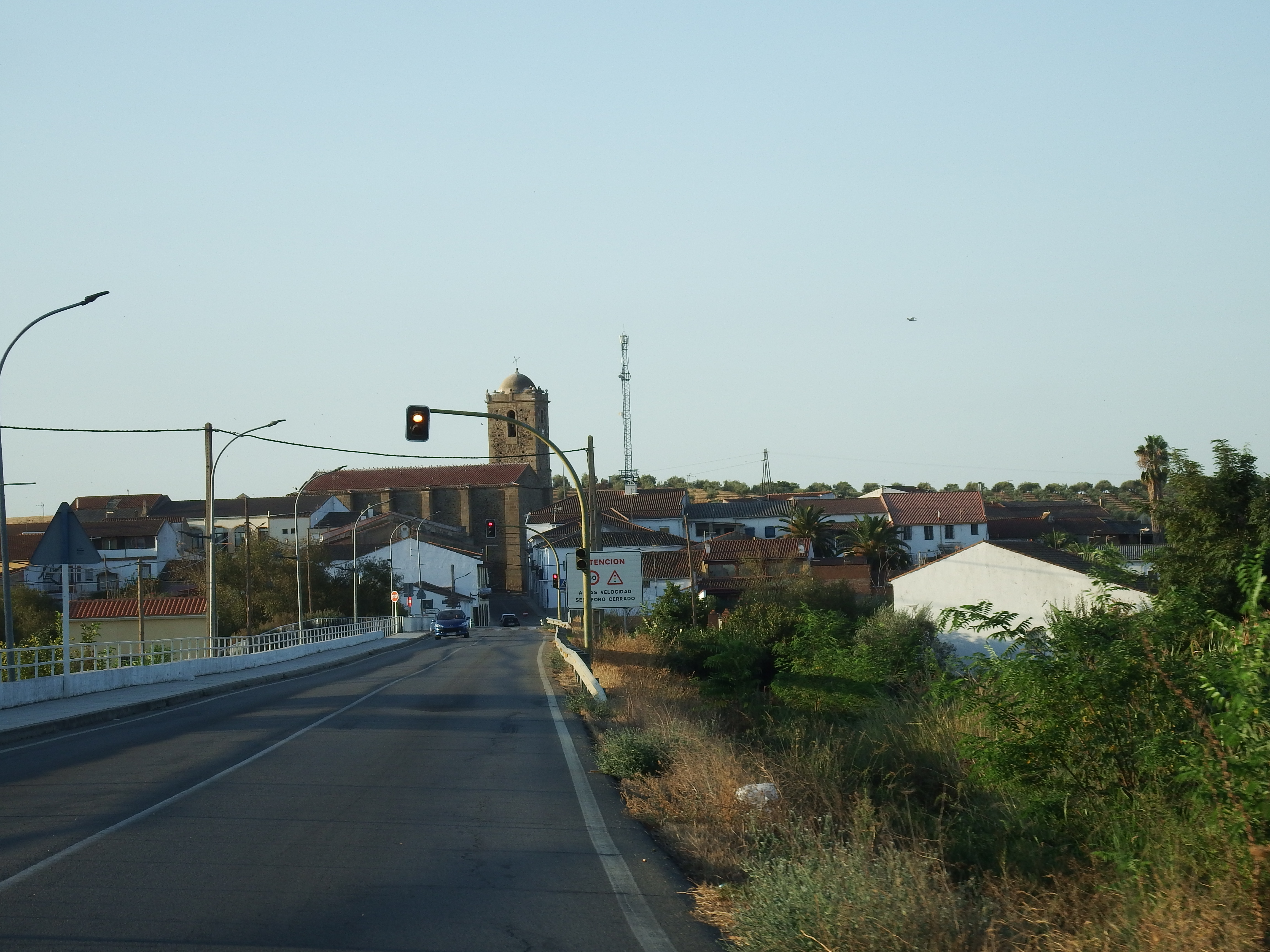 Madrigalejo